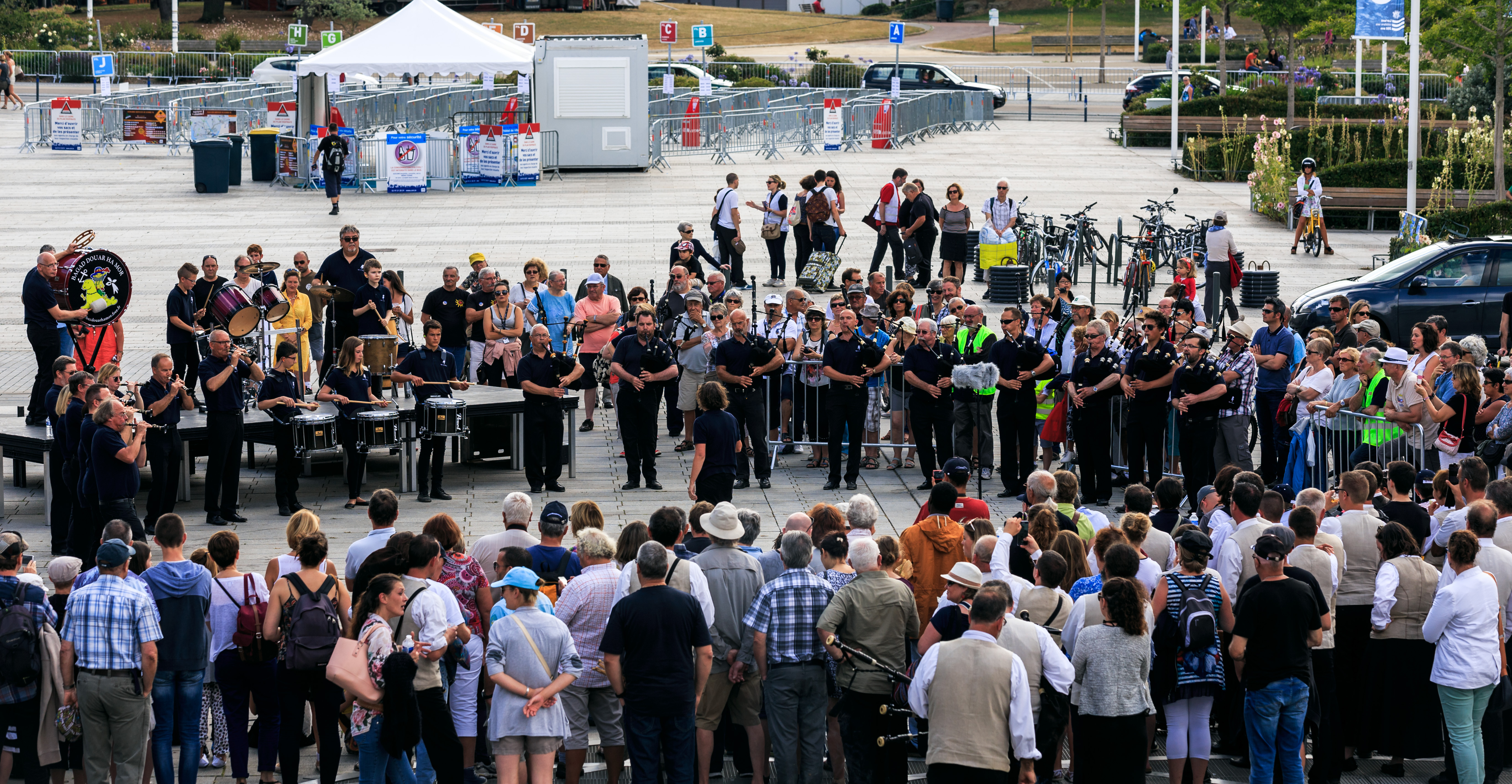 Épreuve d'été du Championnat national des bagadoù de 4e catégorie poule B organisée dans le cadre du Festival Interceltique de Lorient en Bretagne.